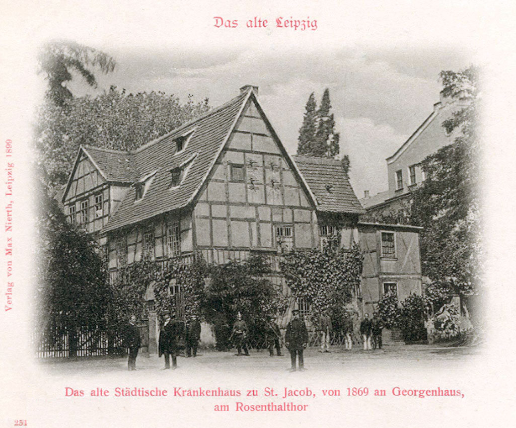 Das alte Jacobshospital in Leipzig